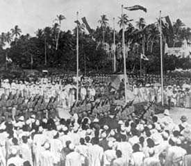 Einweihung des Wißmann-Denkmals von Adolf Kürle in Daressalam 1908